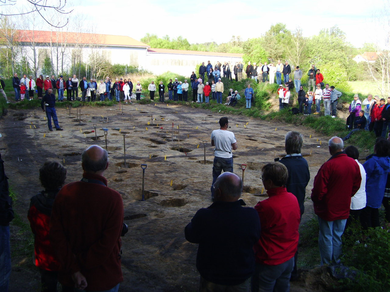 En omkring 40 m lång och 9 m bred hallbyggnad från yngre järnåldern uppvisas för allmänheten i Ytterby i Kungälvs kommun av arkeologerna Johan Ling (närmast i bild) och Ulf Ragnesten, den 12 maj 2009. Det ingår i det forskningsprojekt som arkeolog Kristina Bengtsson leder sedan ca ett decennium tillbaka, invid Bohusläns näststörsta gravfält, för att hitta de norska konungarnas kungsgård som var grunden för den stad vid namn Kungahälla (ursprunget till dagens Kungälv), som växte fram på 1100-talet. Utgrävningsplatsen klargörs i färgskiftningarna i jorden och de stora hålen i marken. Färgskiftningarna är väggrännor och i hålen satt stolpar som höll upp byggnaden. Utifrån dem kan man se husets form.